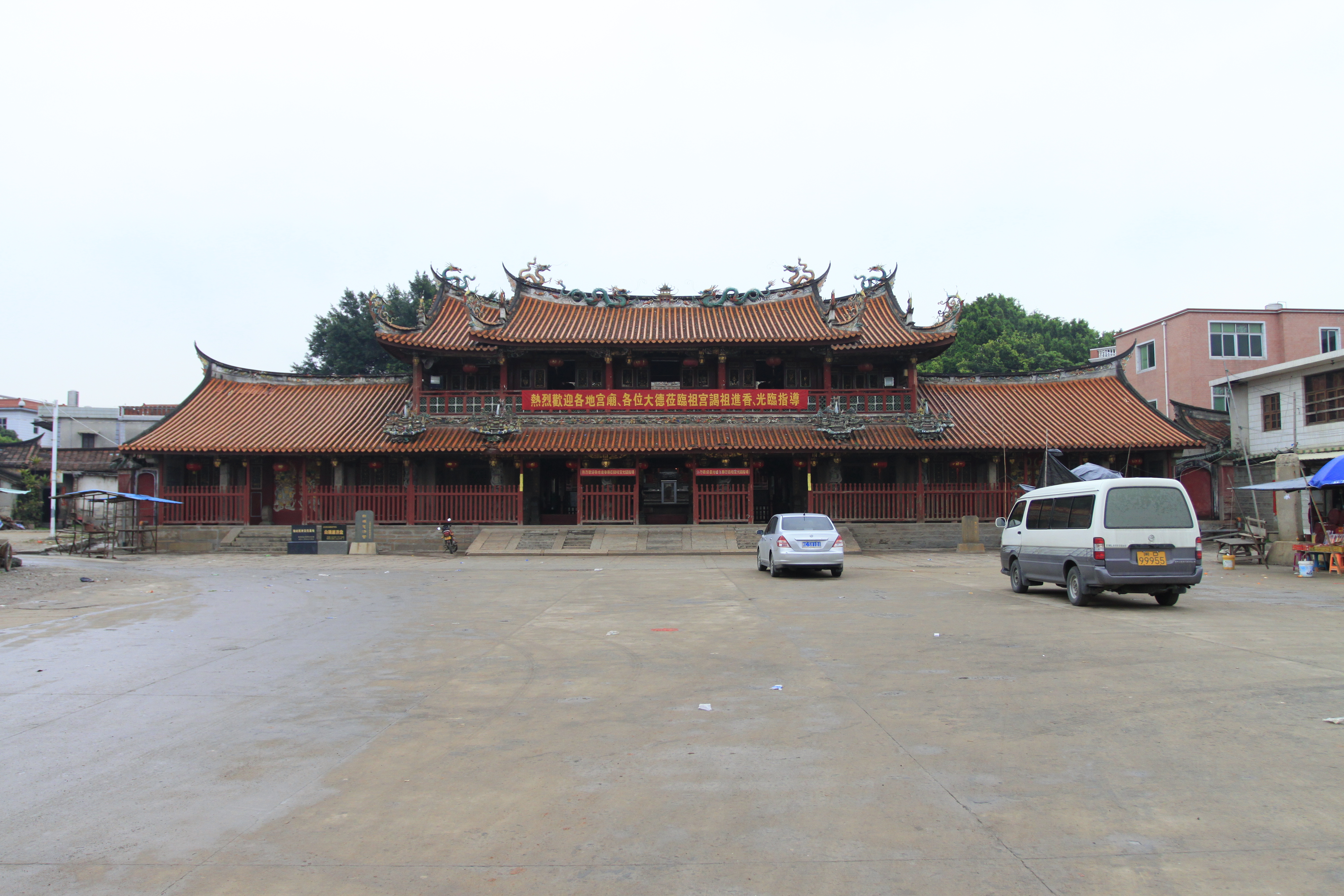 白礁慈济宫，位于中国福建省龙海市，是全国重点文物保护单位。